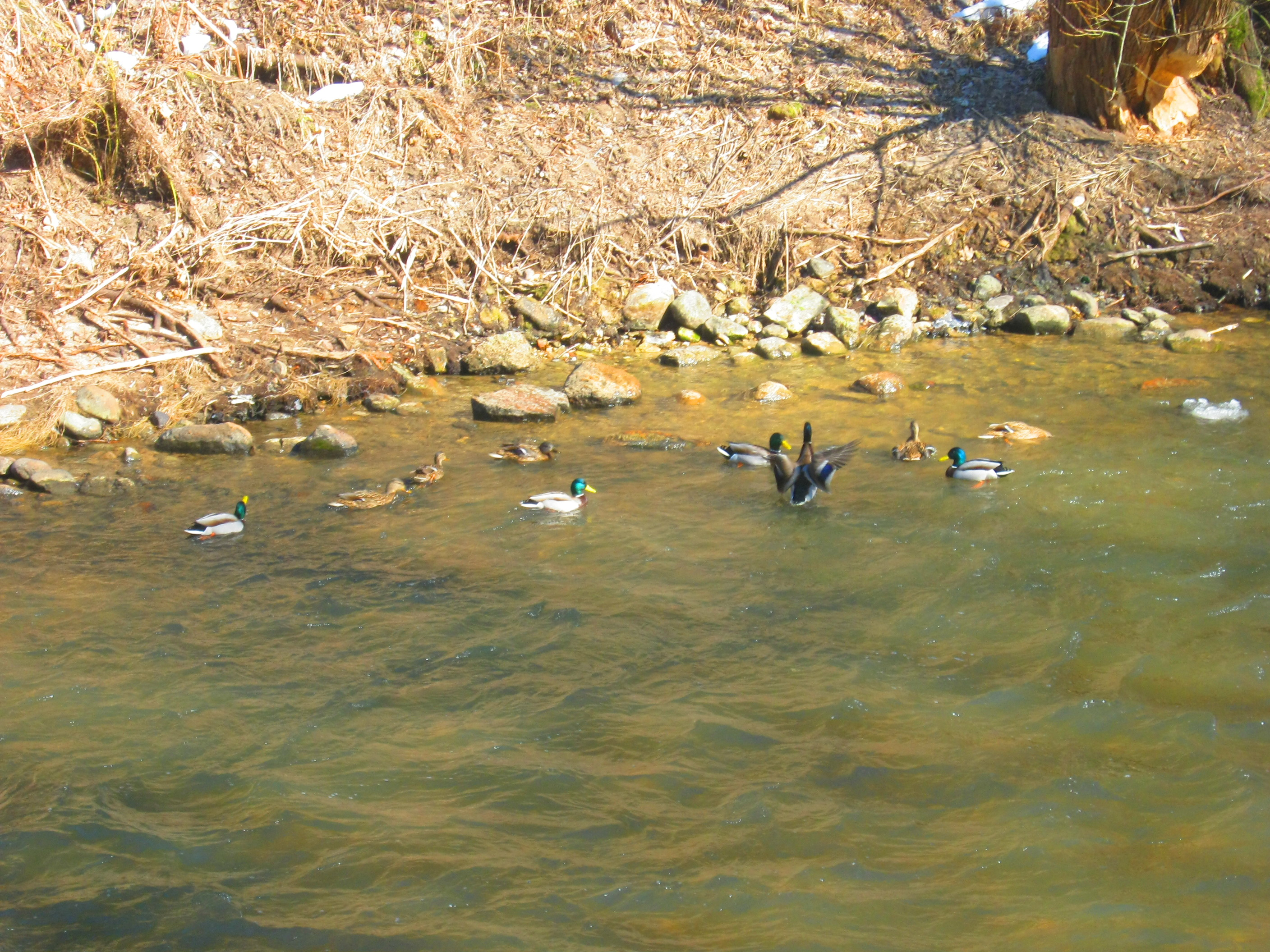 Vilnius